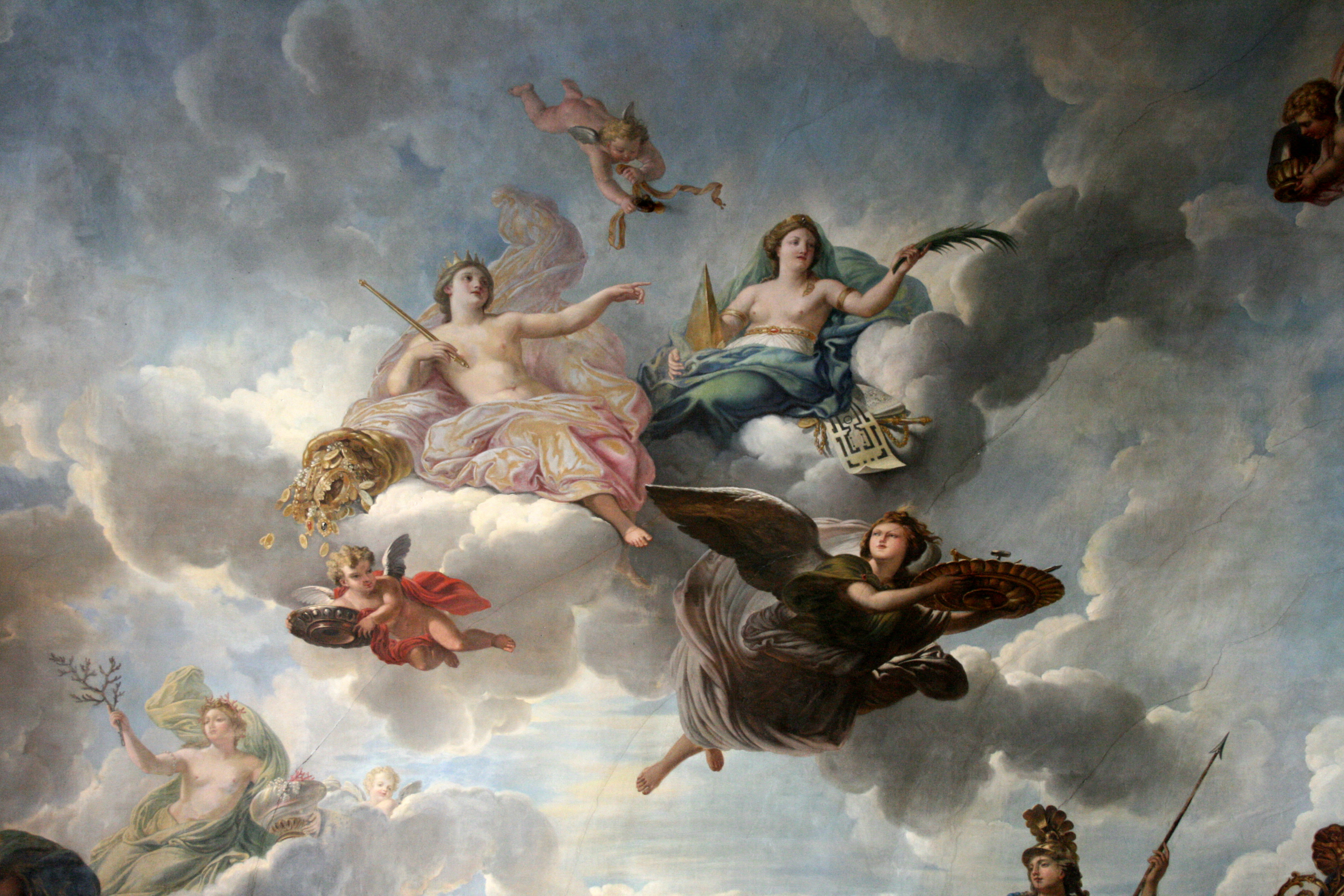 Abundance and Liberalitylabel QS:Len,"Abundance and Liberality" label QS:Lde,"Überfluss und Freiheitlichkeit" label QS:Lfr,"l'Abondance et la Libéralité"